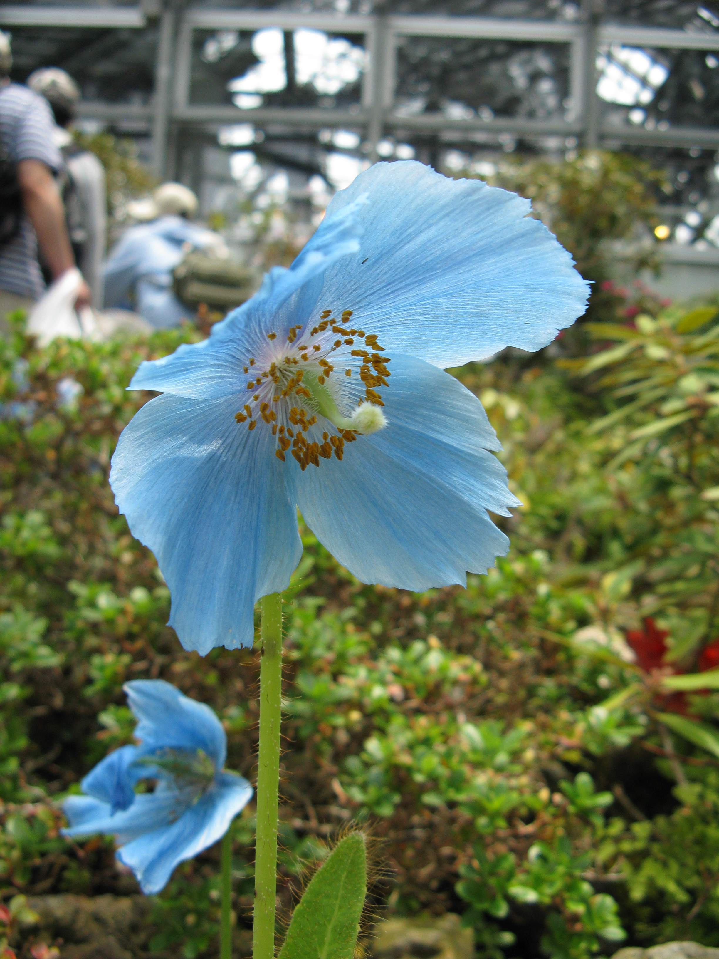 Scientific name Meconopsis grandis Place:Sakuya Konohana Kan,Osaka,Japan